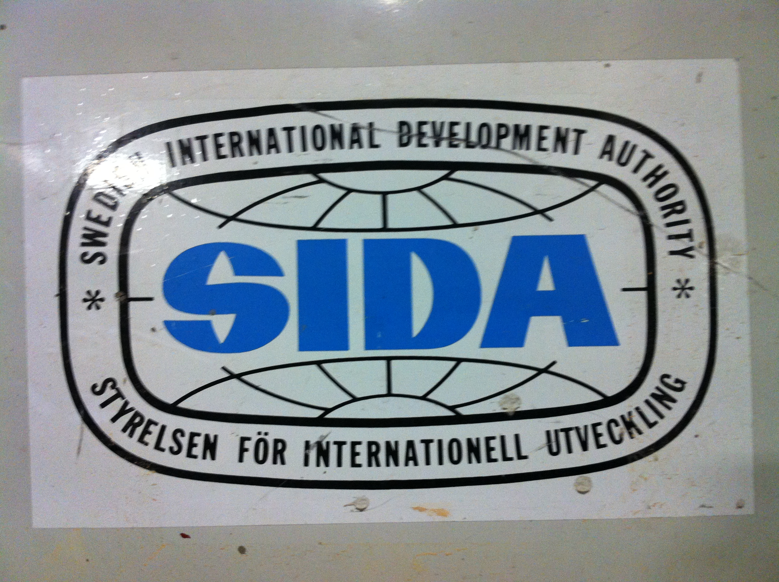 Loga för 1995 upplösta myndigheten SIDA.